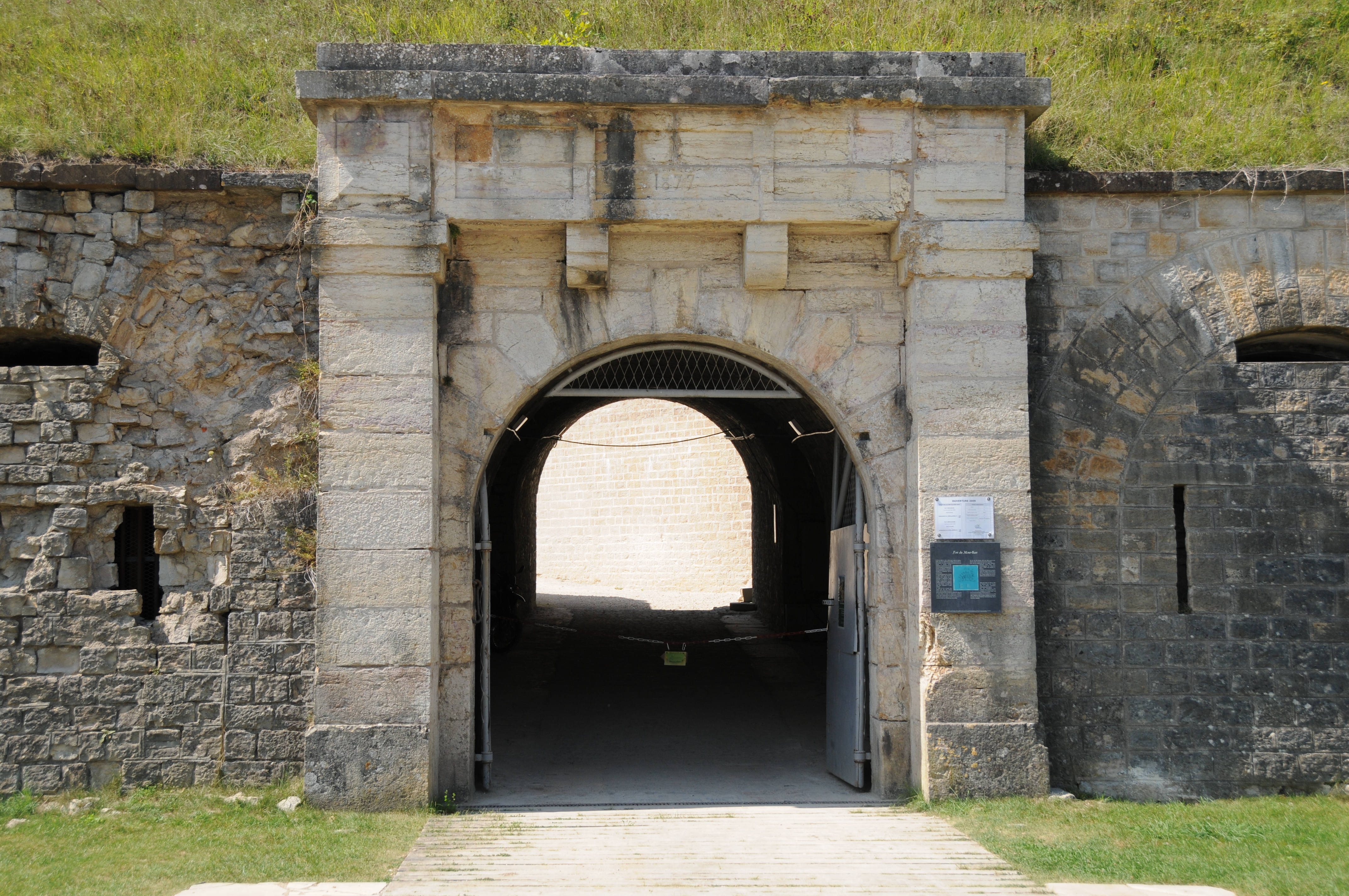 Entrée principale. Bart hill fortifications : main entry.